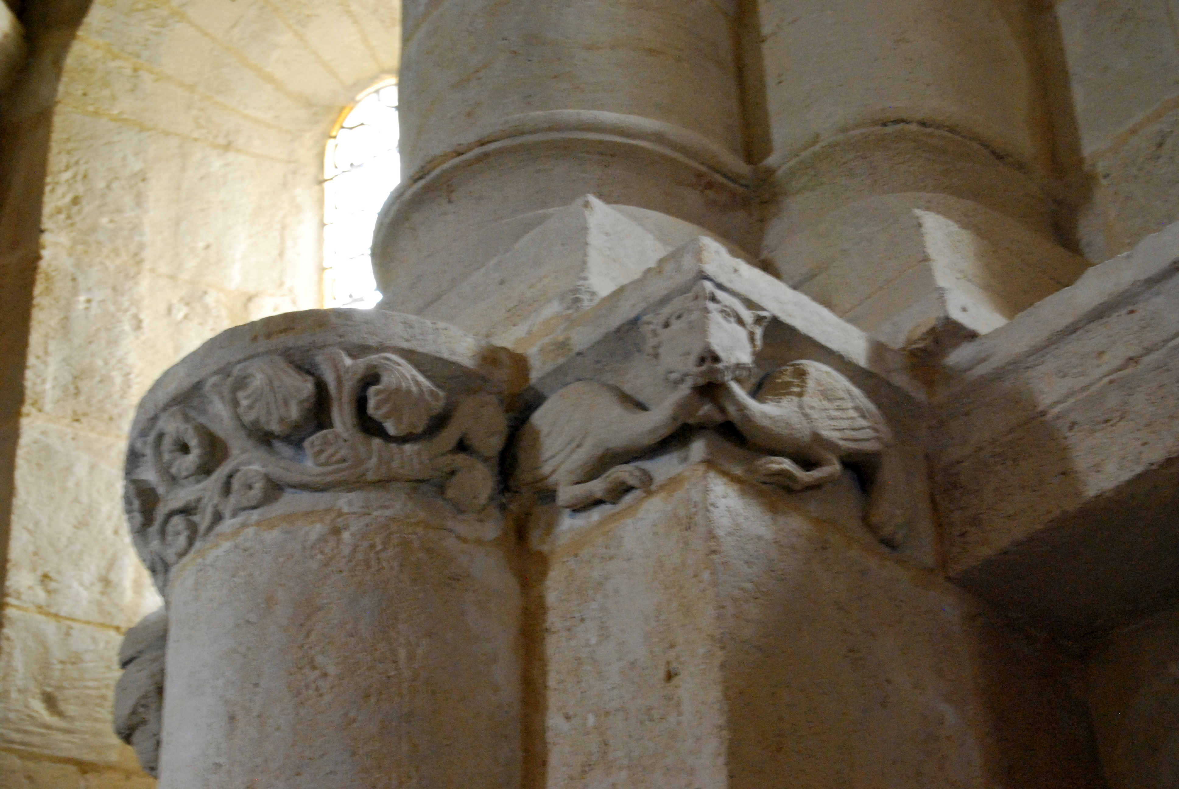 Église Saint-Quentin de Baron